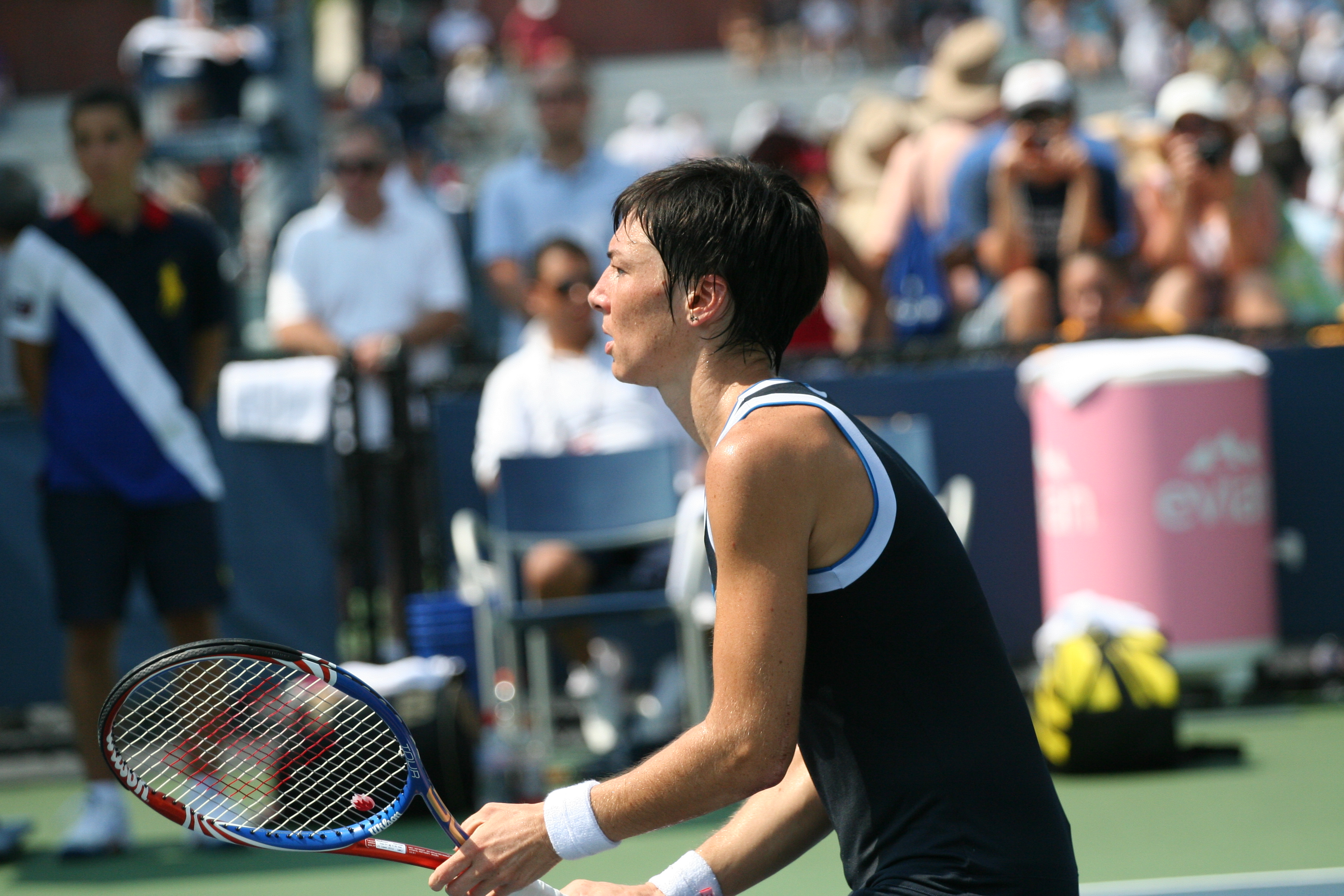 U.S. Open Sept. 1, 2010